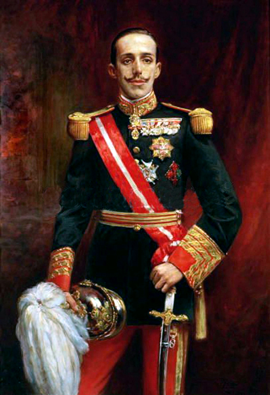 Retrato del rey Alfonso XIII de España (1886-1941), vestido con uniforme de gala de capitán general.